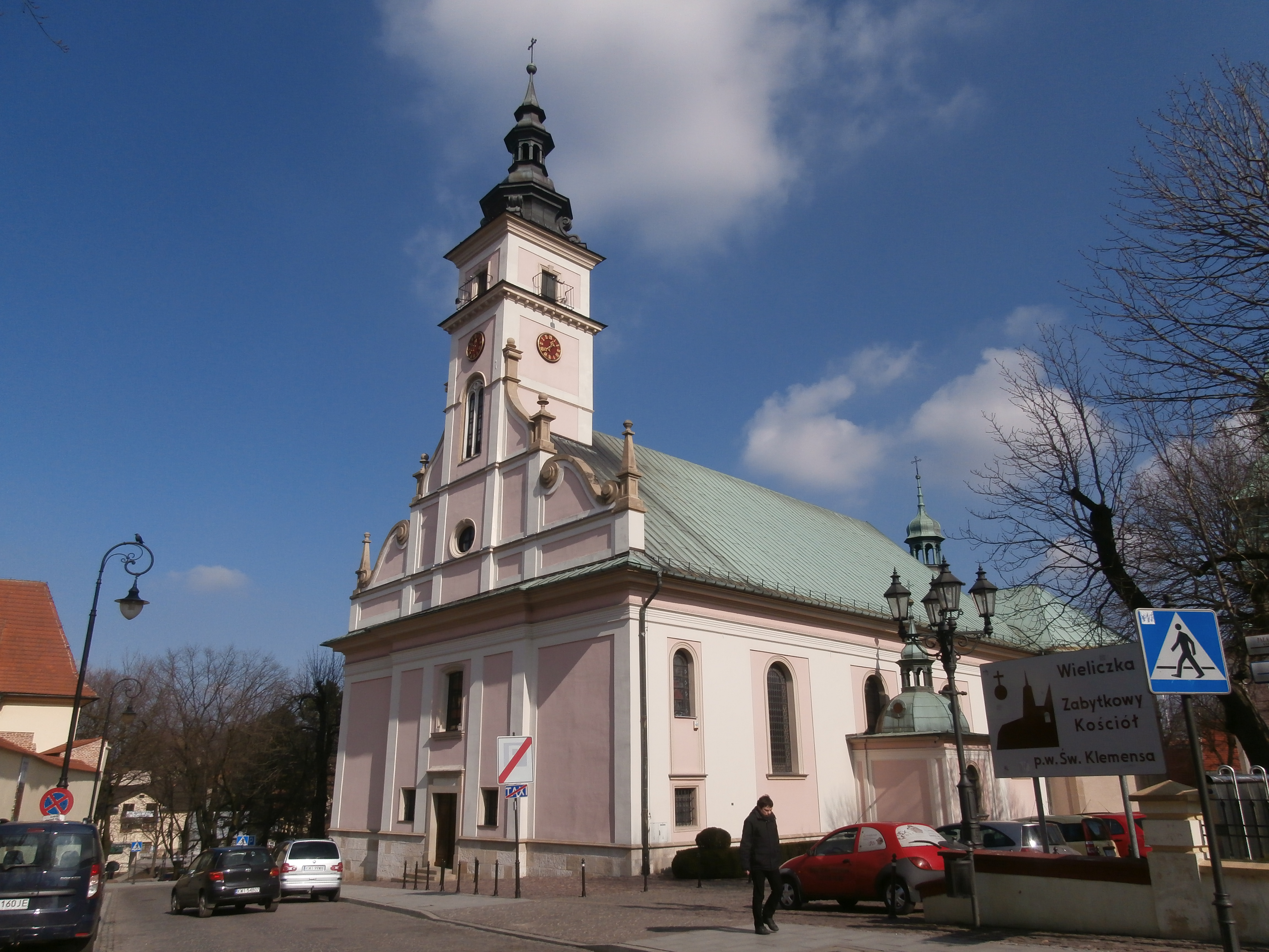 Kościół Św. Klemensa w Wieliczce, widok od strony zachodniej.